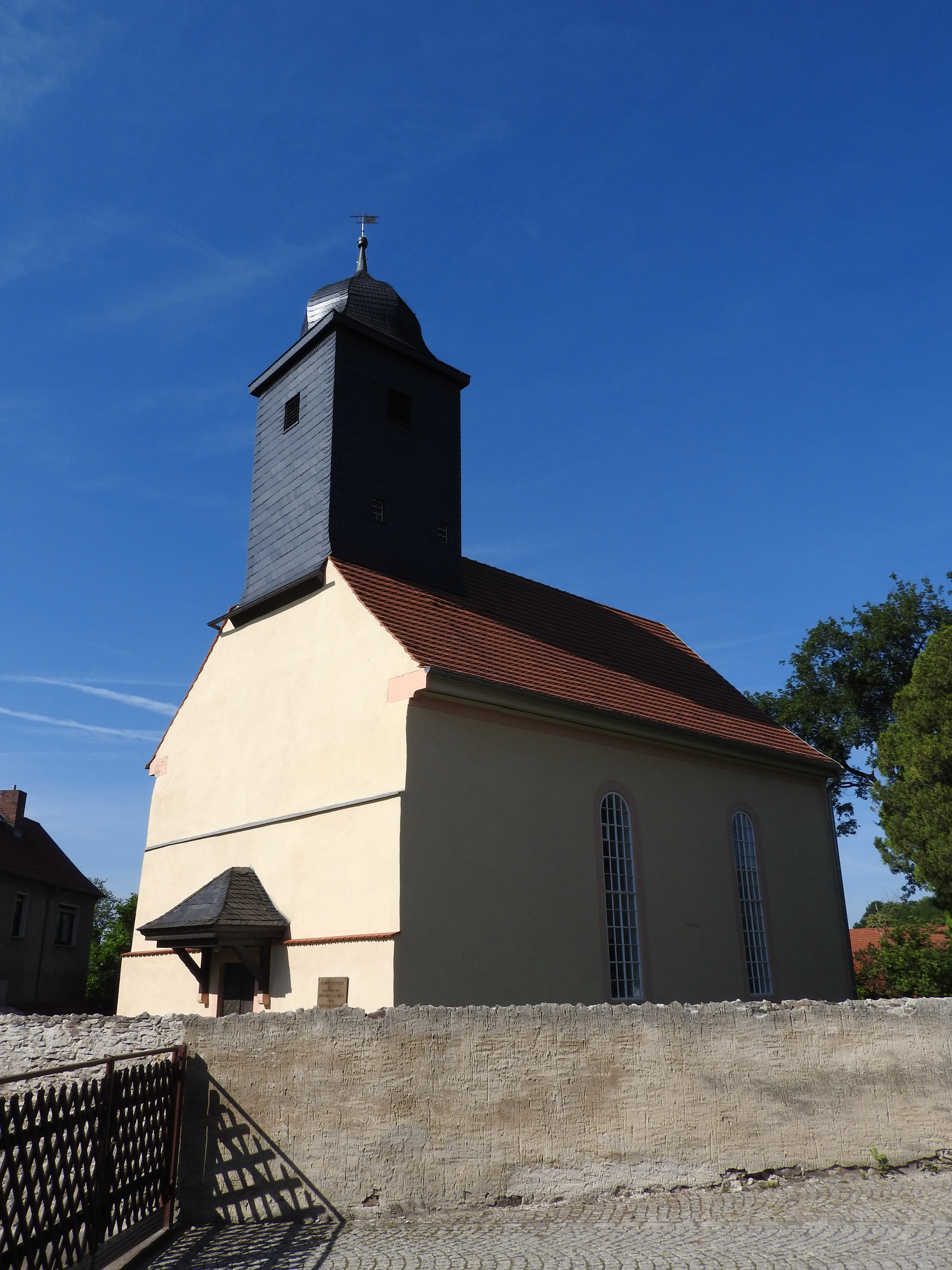 Kirche in Moderwitz, Thüringen